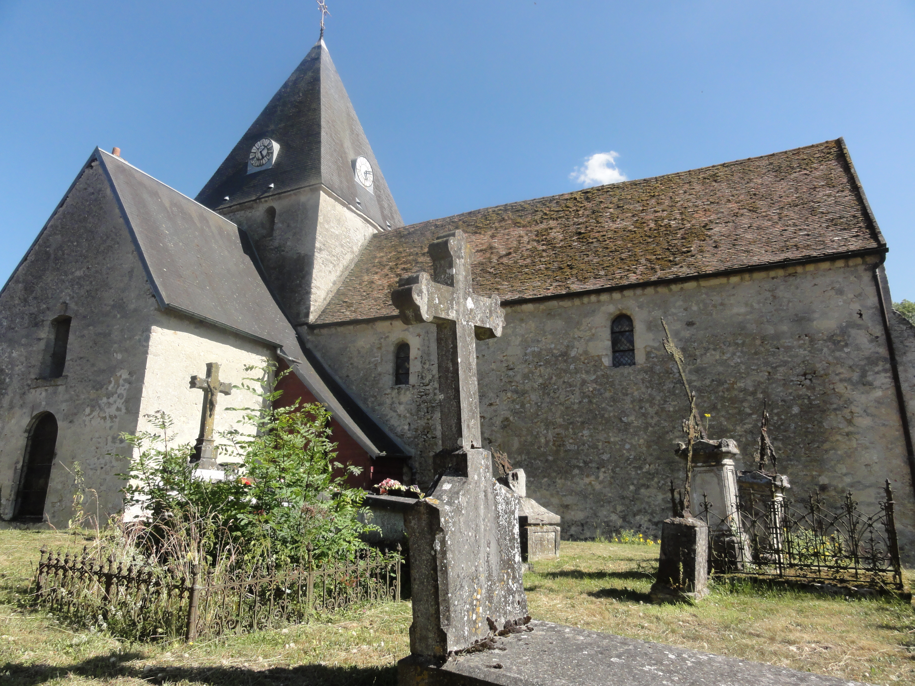 Saint-Thomas (Aisne) église